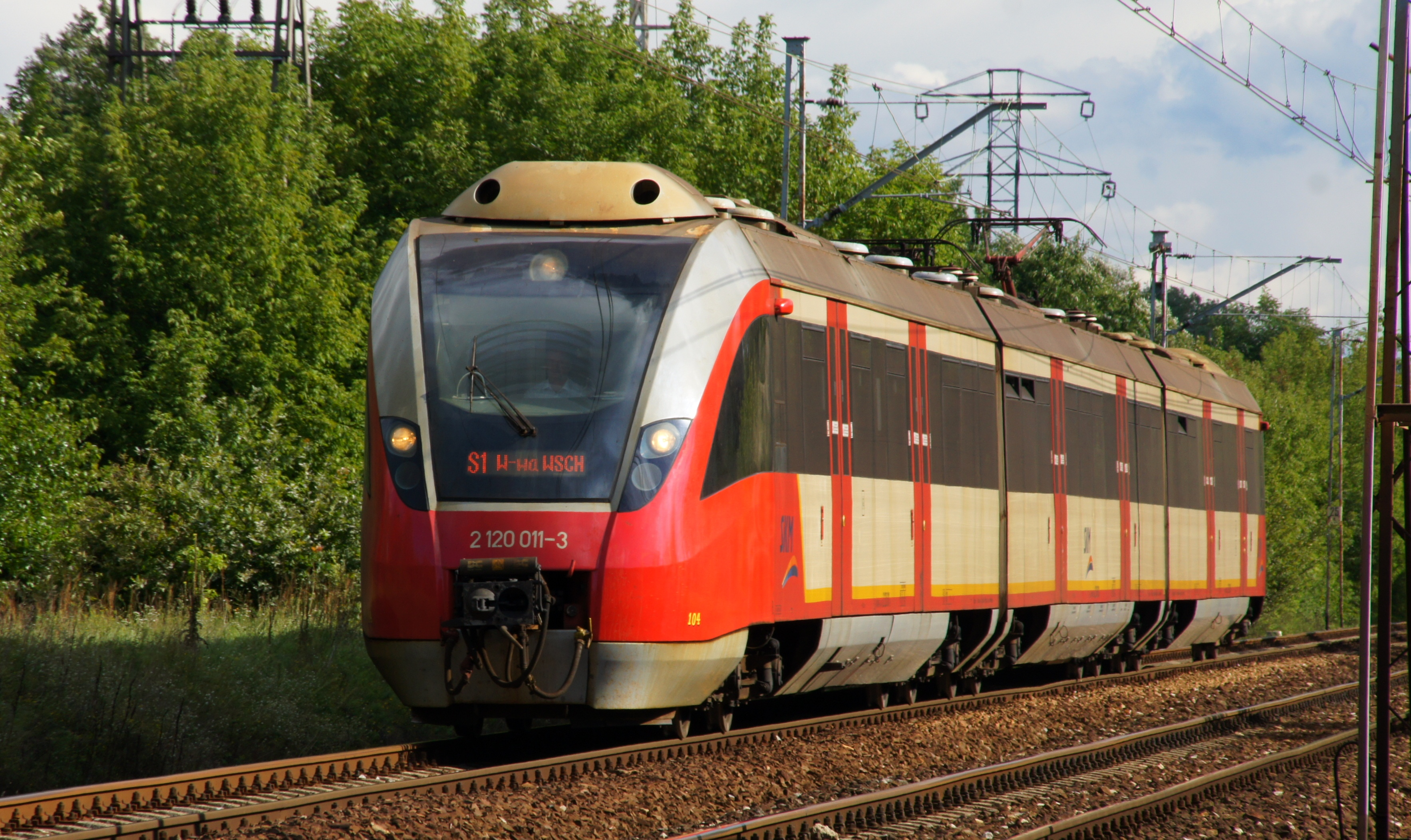 typu 14WE